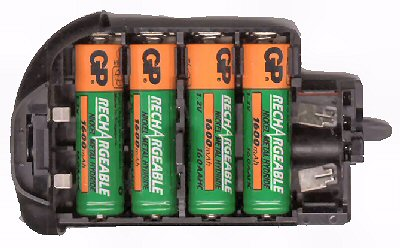 Batteriefach des Funktionshandgriffs Minolta_VC-9 für die Minolta Dynax 9